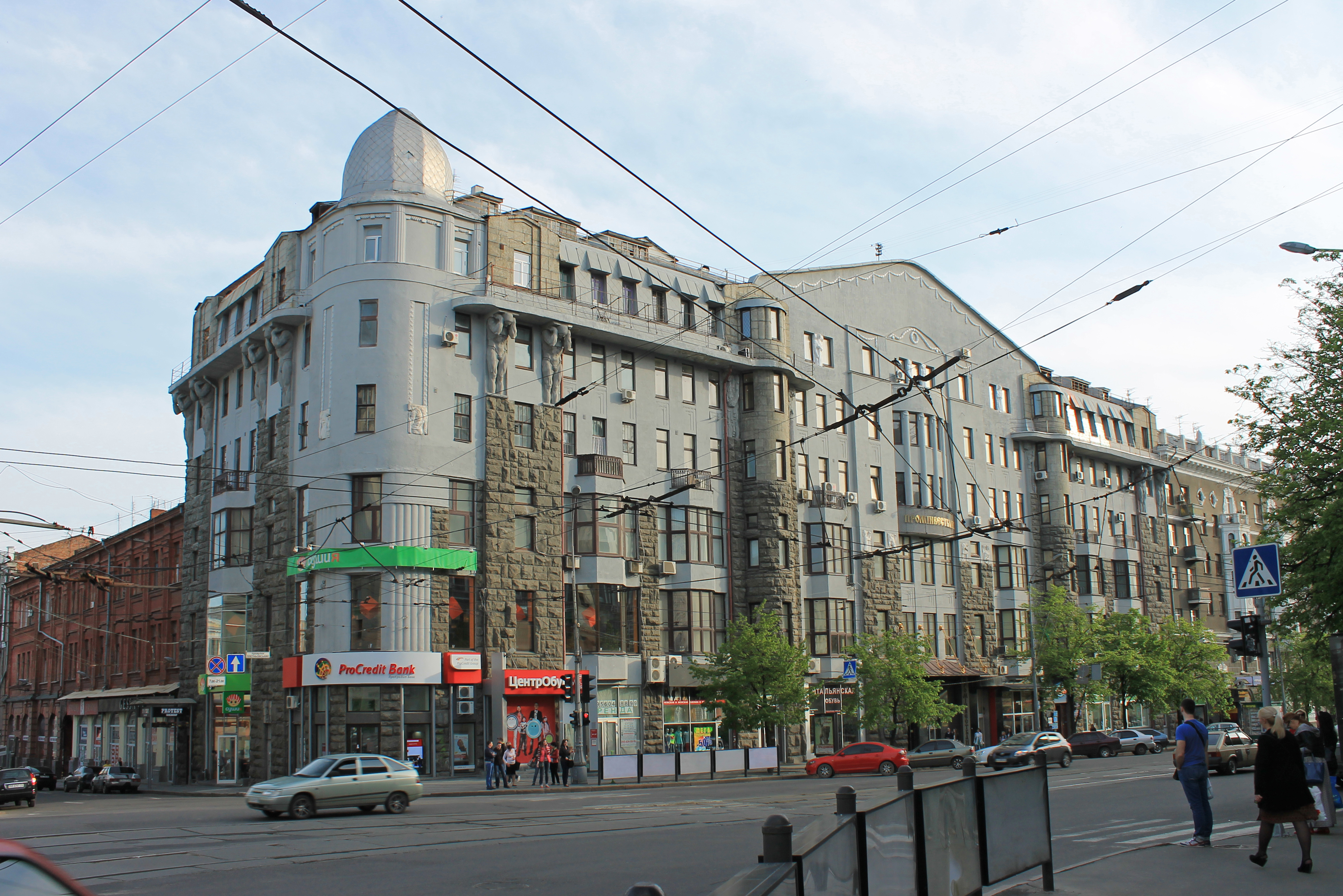 Колишній Міський купецький банк із готелем «Асторія», майд. Павлівський, 10, м. Харків